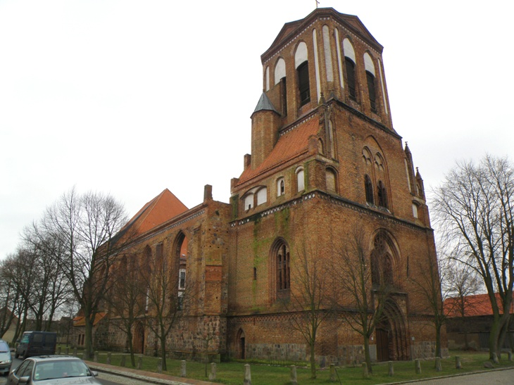 kościół